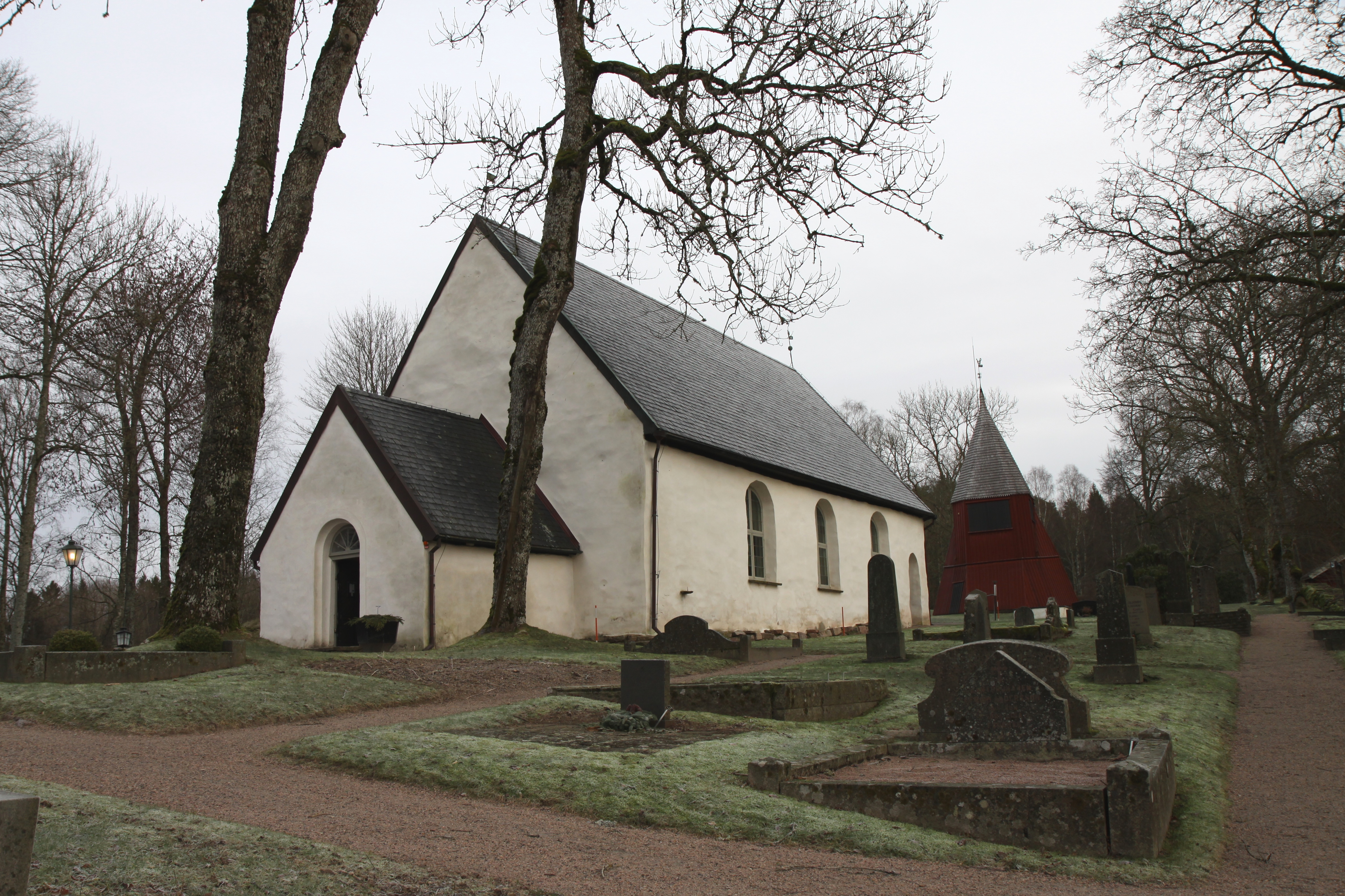 Borgstena kyrka